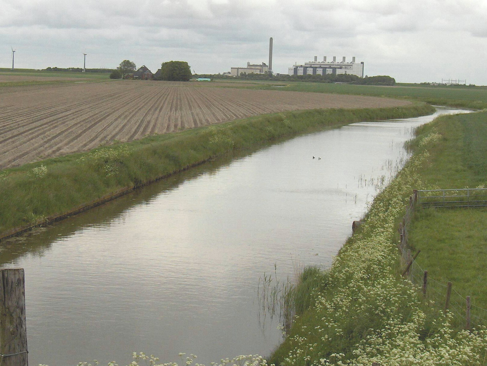 Het Groote Tjariet vanaf de slaperdijk. Op de horizon de Eemshaven.